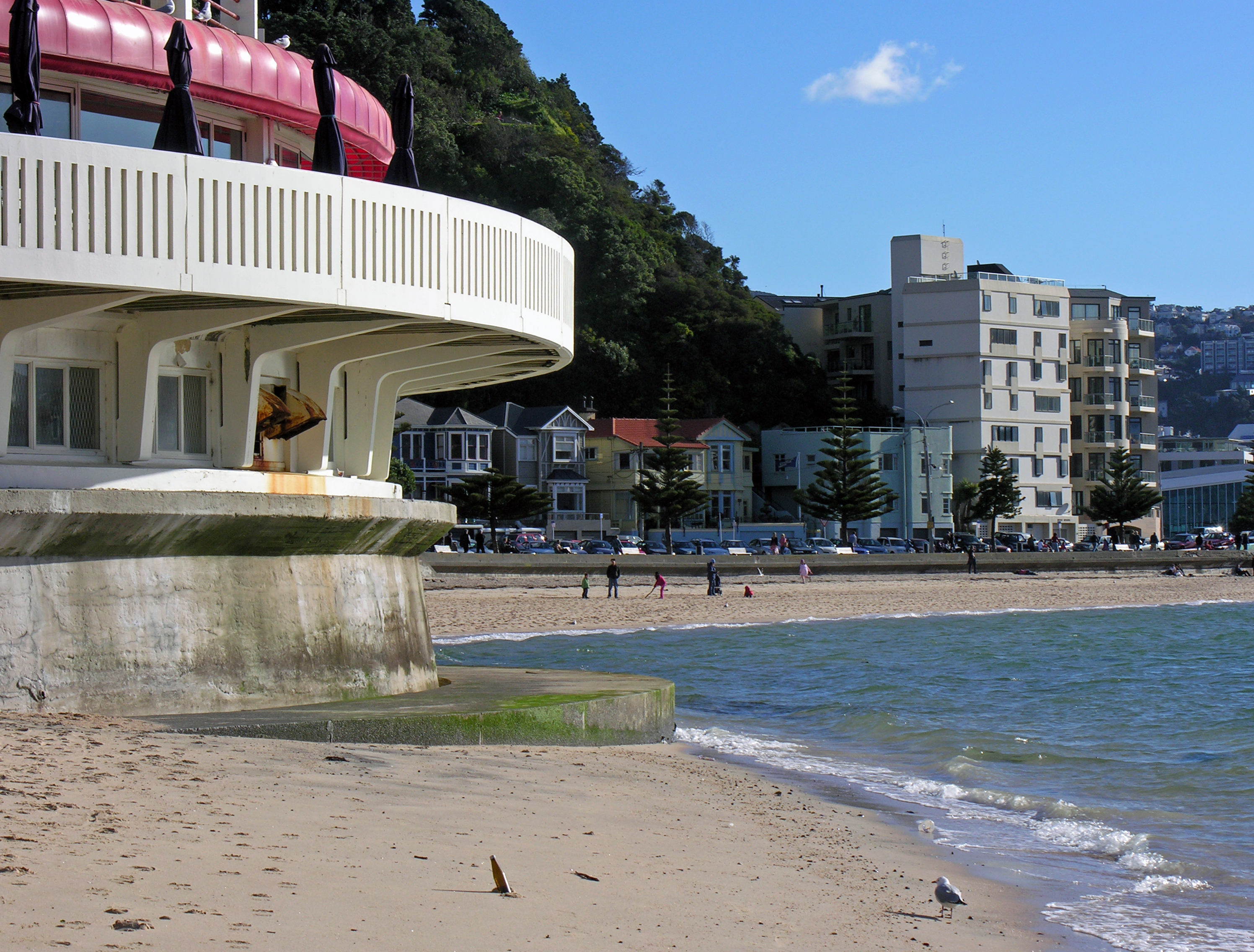 13 August 2006 Band Rotunda in Oriental Bay